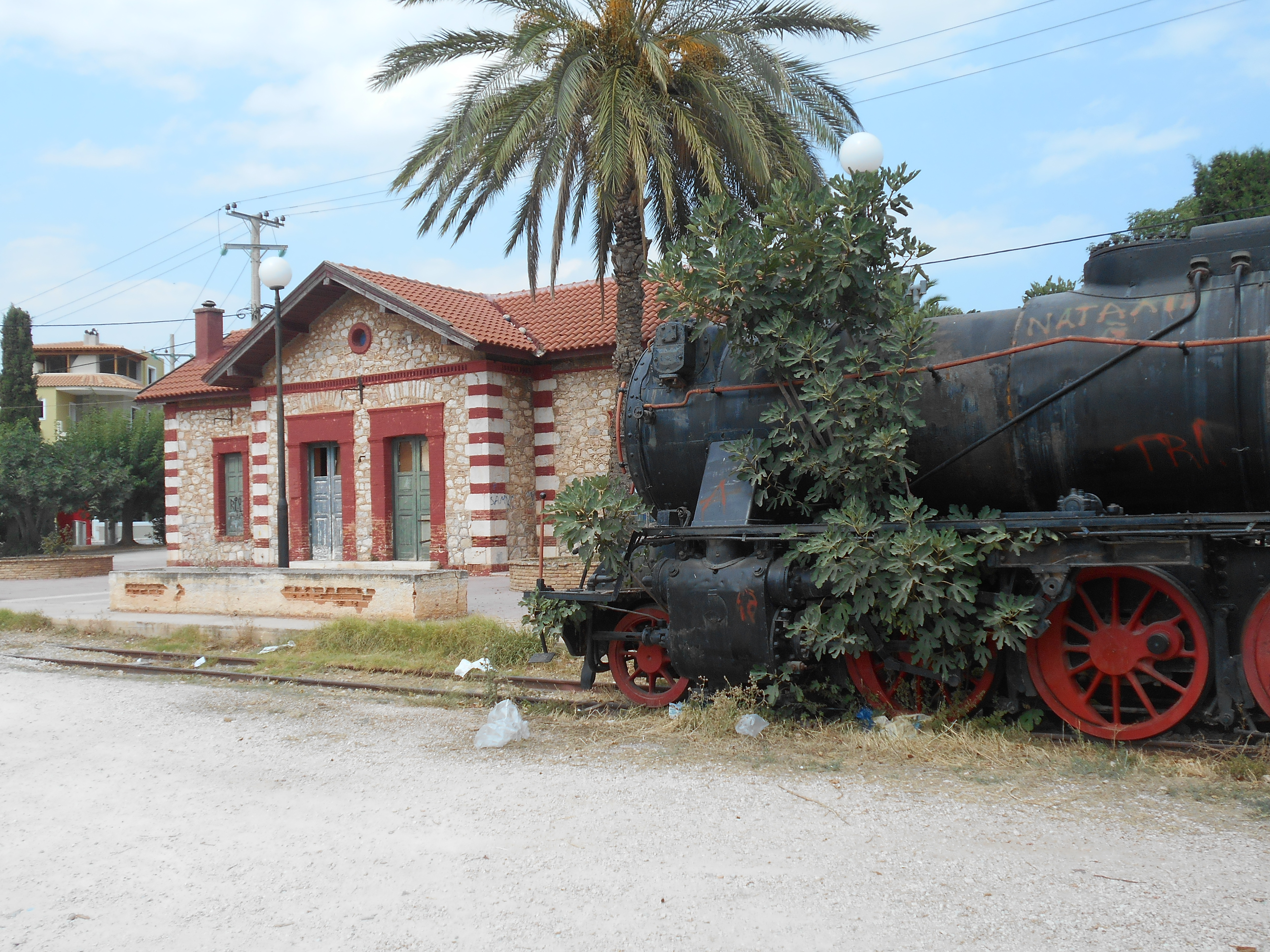 Bahnhof Markopoulo (Attika) mit durchwucherter Dampflok